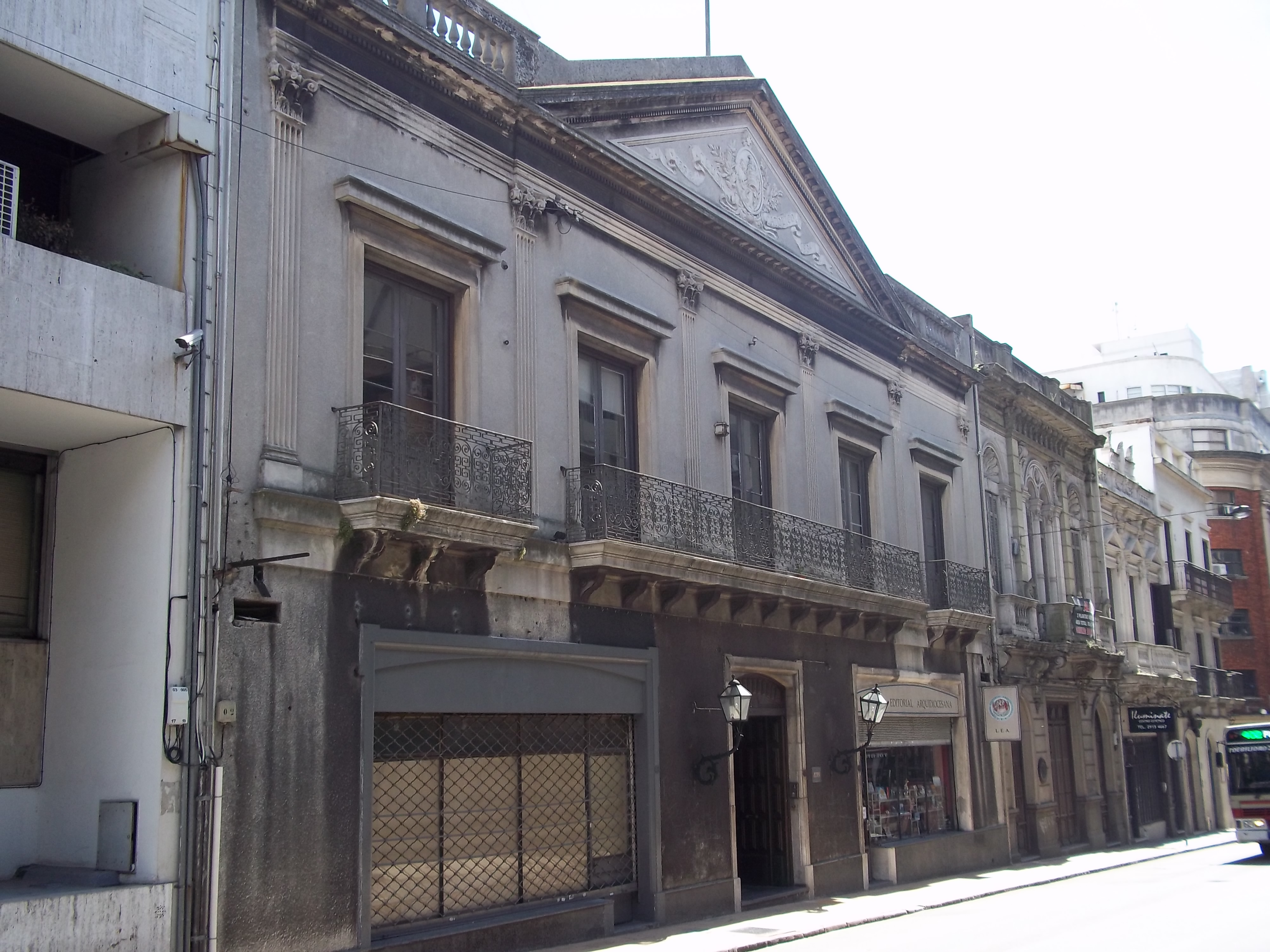 Sede de la radio 770 AM, Oriental.